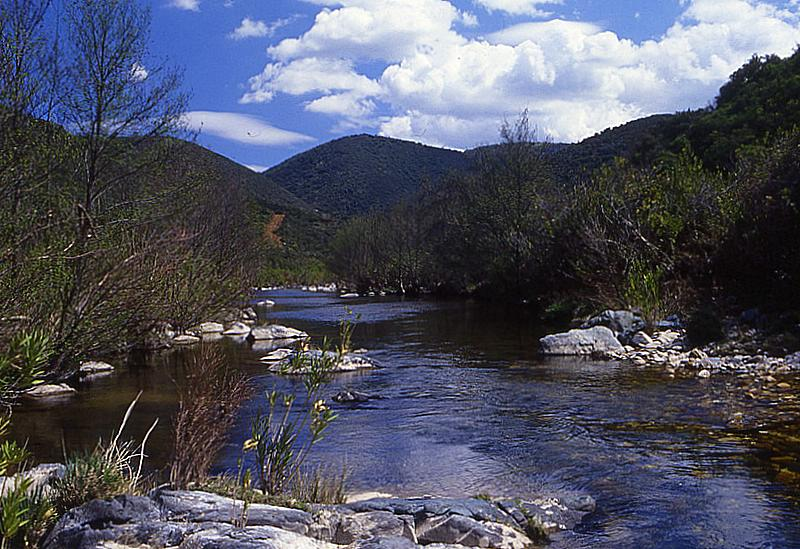 Río Yeguas en el Parque Natural Sierra de Cardeña y Montoro.